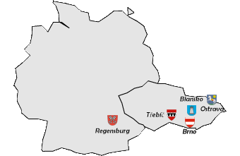 Speelsteden EK Honkbal 2014 in Duitsland en Tsjechië.